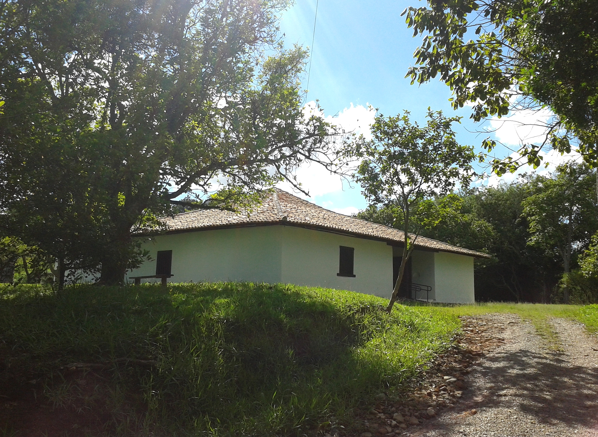 Casa do Sítio Mandu, Cotia, SP, Brasil.